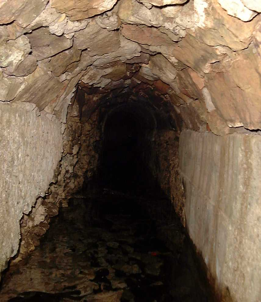 Innere einer römischen Wasserleitung. Brunnenstube Nähe Nettersheim Sonstiges: Ausschnitt aus Originalfoto